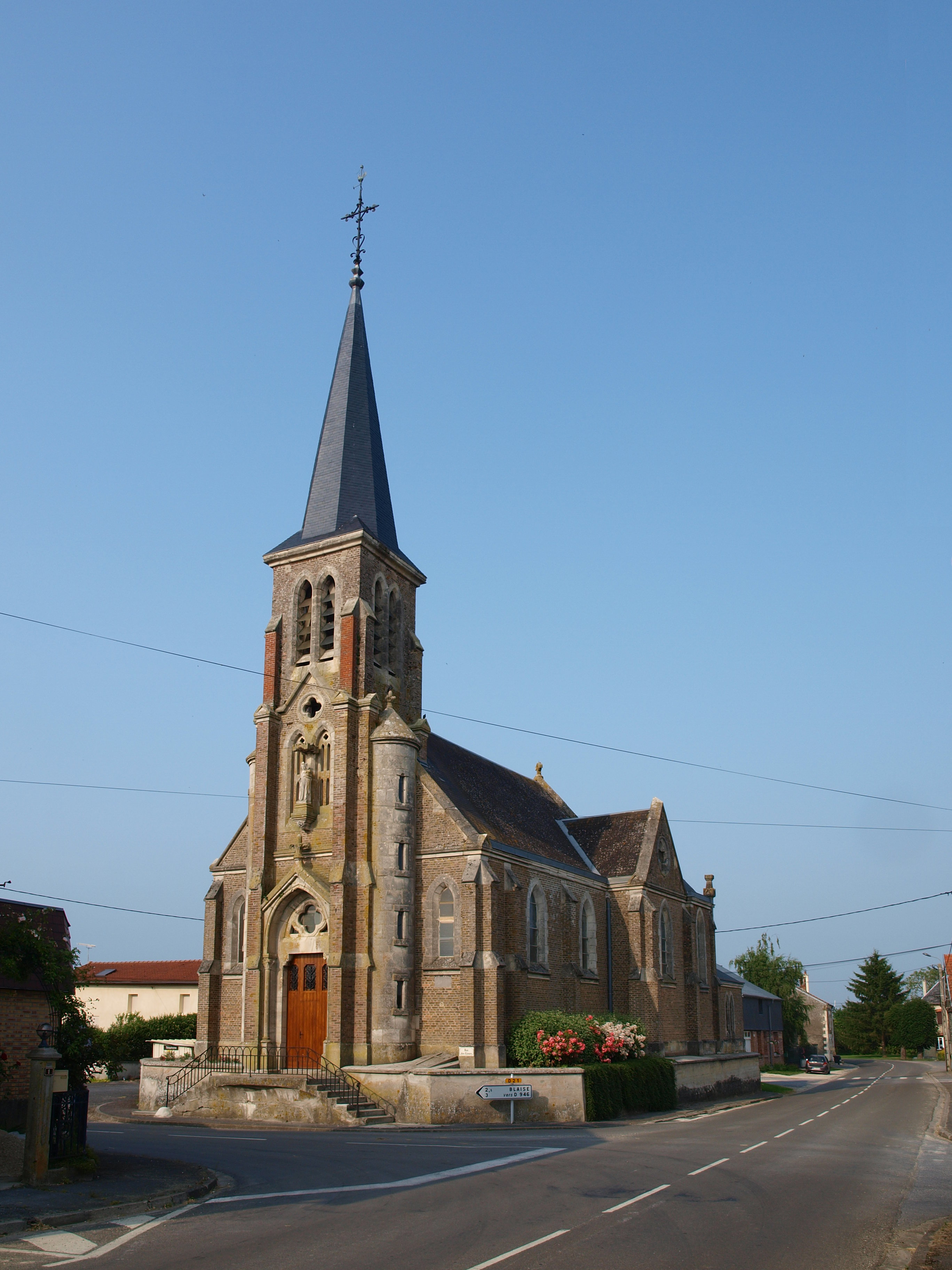 Sainte-Marie (Ardennes, France) ; église